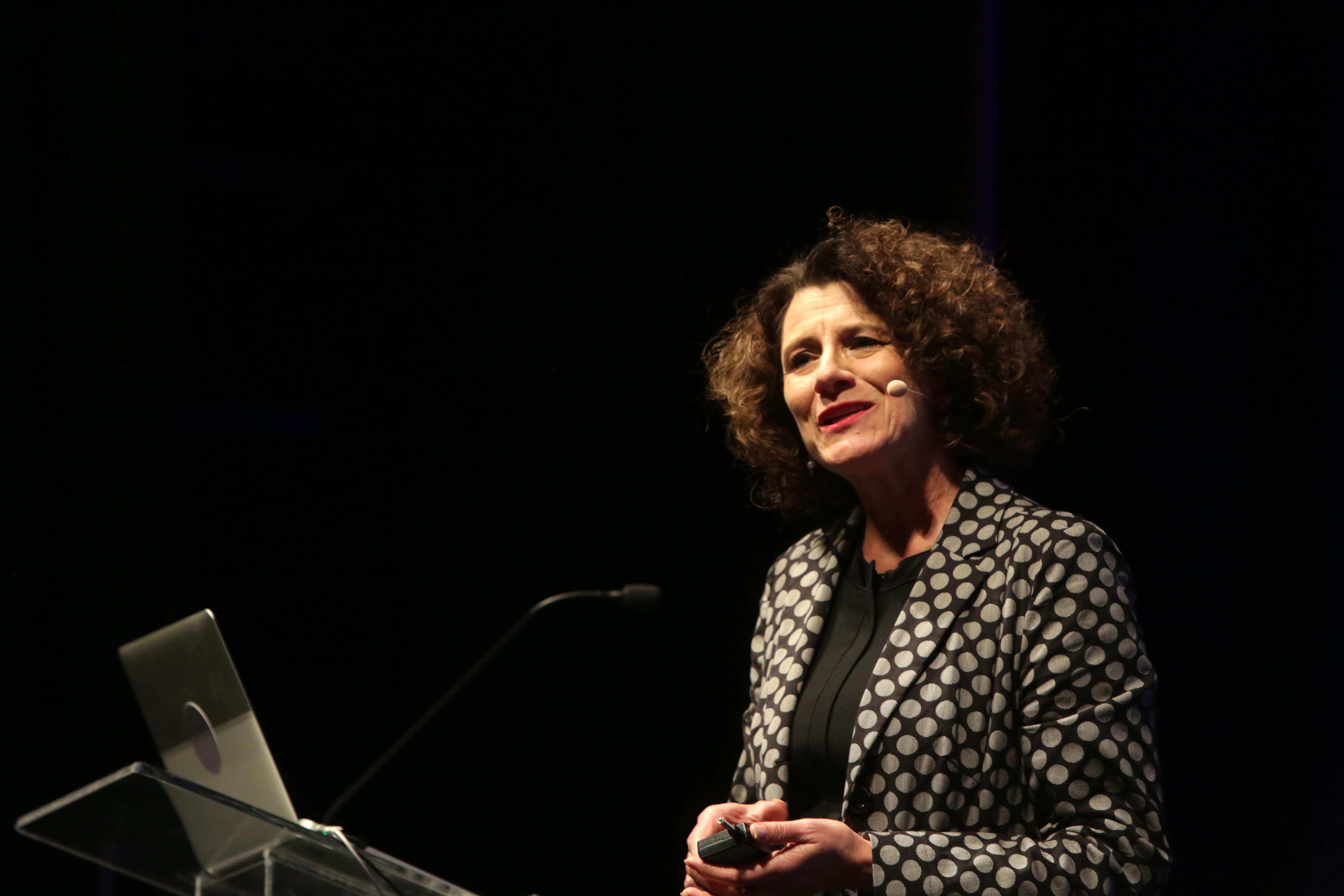 Susan Pinker no Fronteiras do Pensamento São Paulo 2017 Convidada: Susan Pinker, psicóloga canadense Data: 06 de dezembro de 2017 Local: Teatro Santander Crédito das imagens: Fronteiras do Pensamento / Greg Salibian